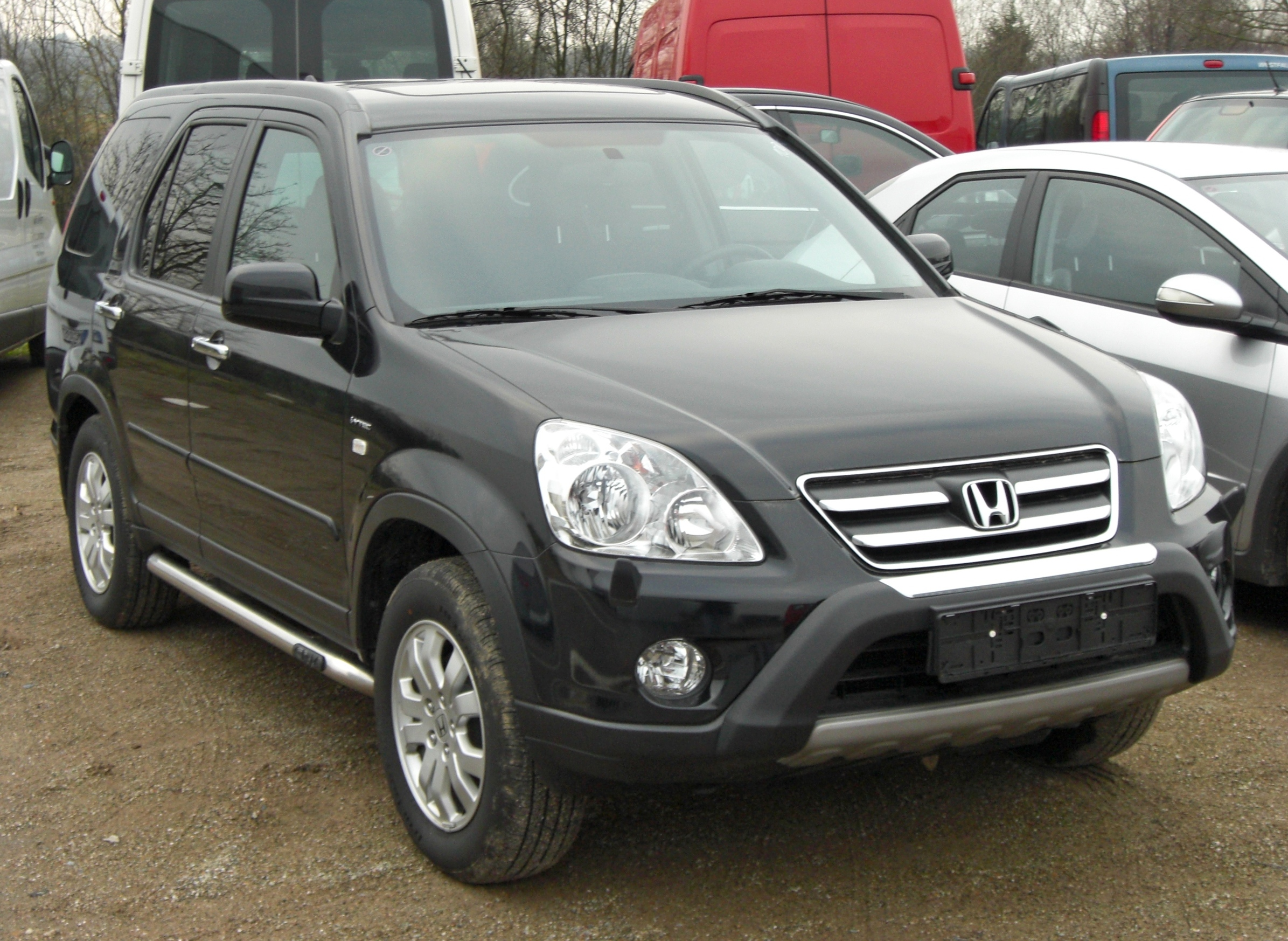 Honda CR-V